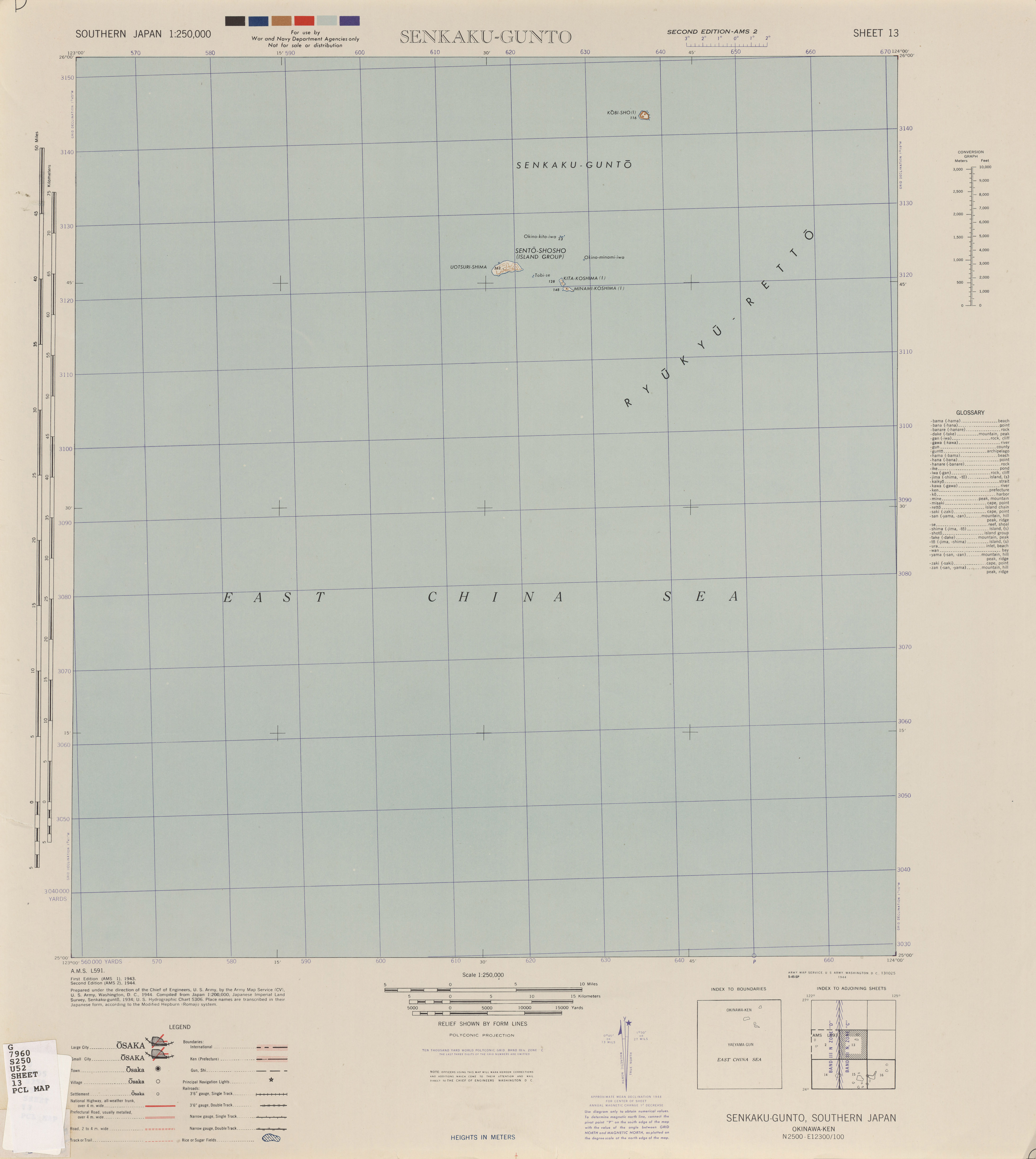 Series L591